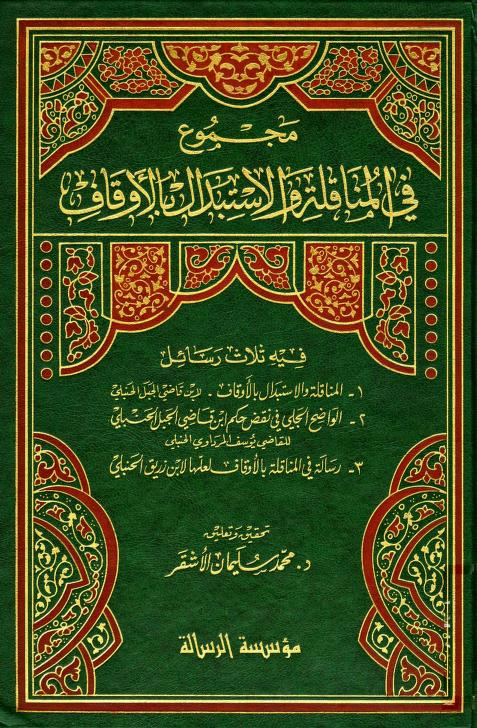 صورة لغلاف الكتاب، تأليف ابن قاضي الجبل